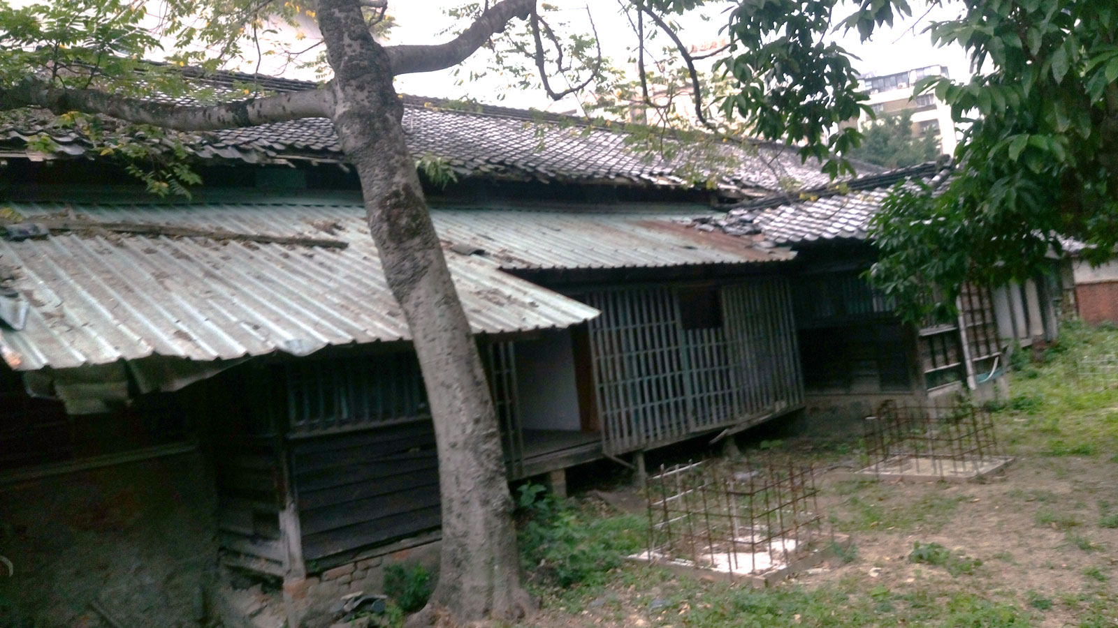 南昌路二段2巷6、8號背面